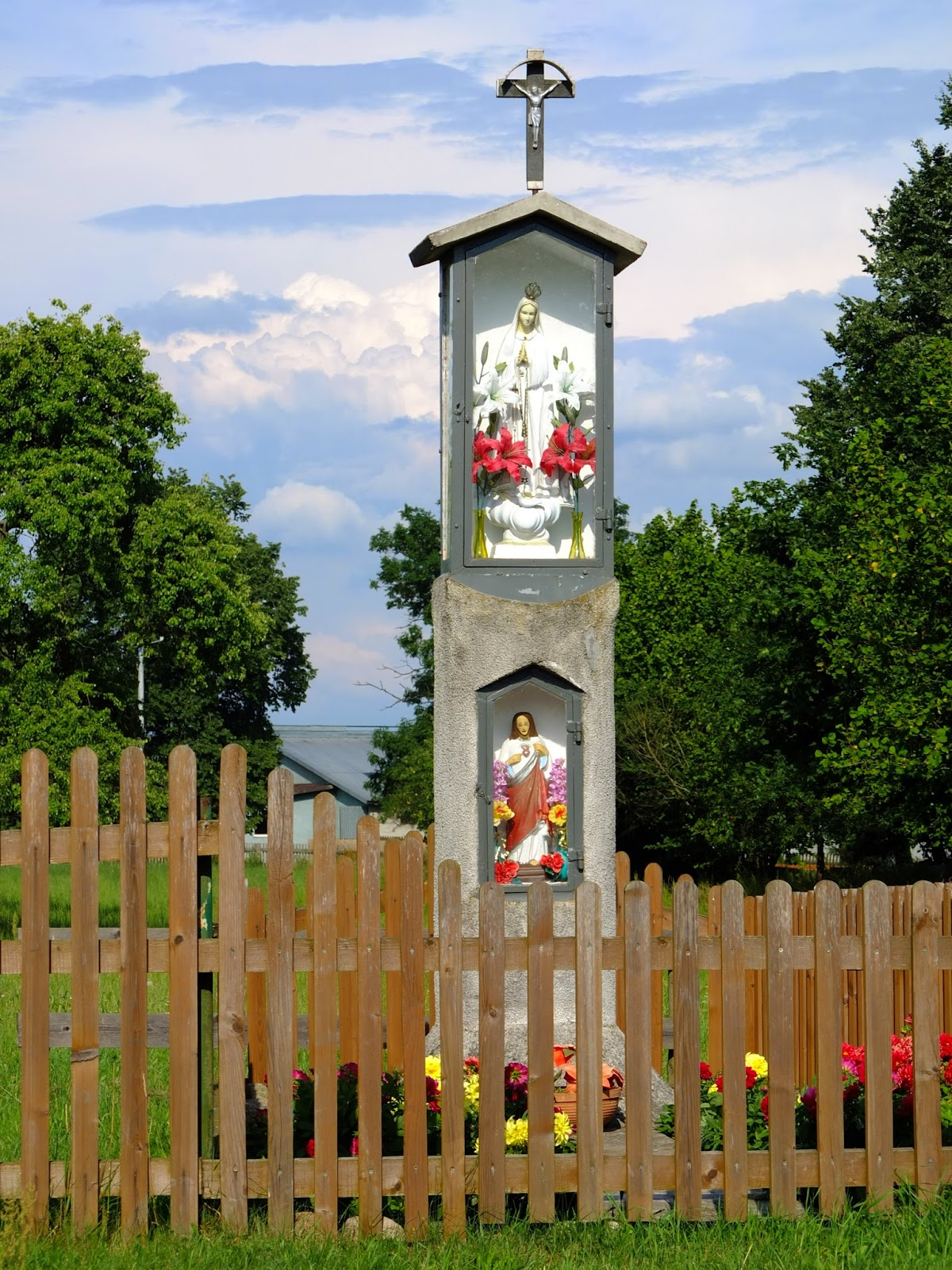 Pużary, kapliczka przydrożna wzniesiona po 1945 r.